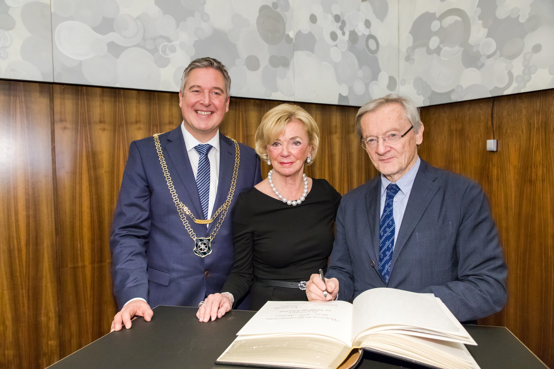 Liz Mohn mit Henning Schulz (links) und Wolfgang Schüssel (rechts) bei der Verleihung der Ehrenbürgerwürde der Stadt Gütersloh